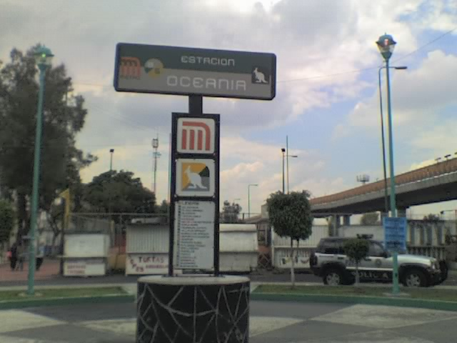 Letrero en la estación Oceanía